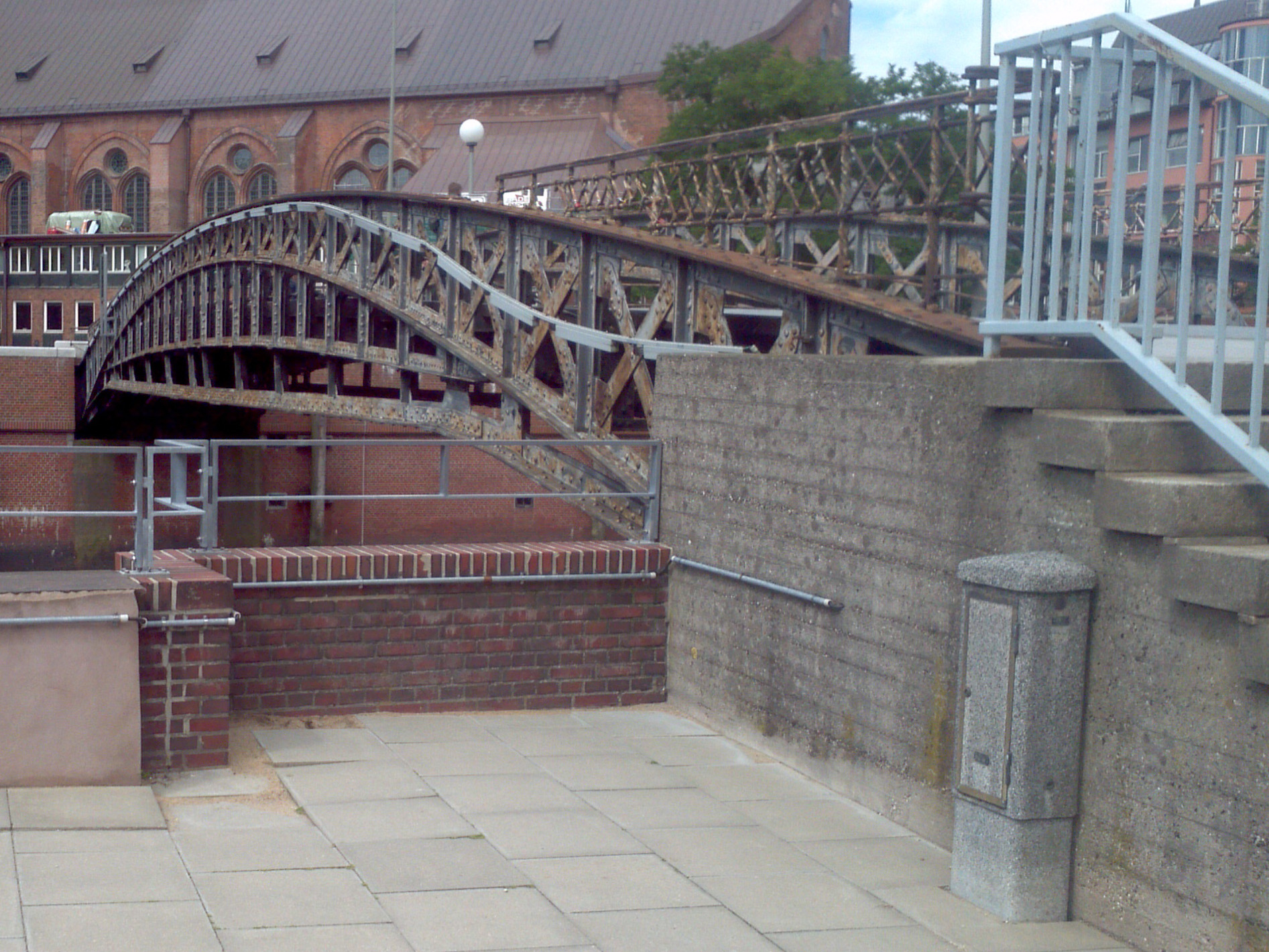 Jungfernbrücke über den Zollkanal, Hamburg